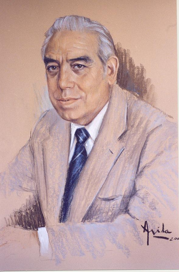 Presidente Dr. Alfonso de la Fuente Chaos. Retrato realizado por José Antonio Ávila.